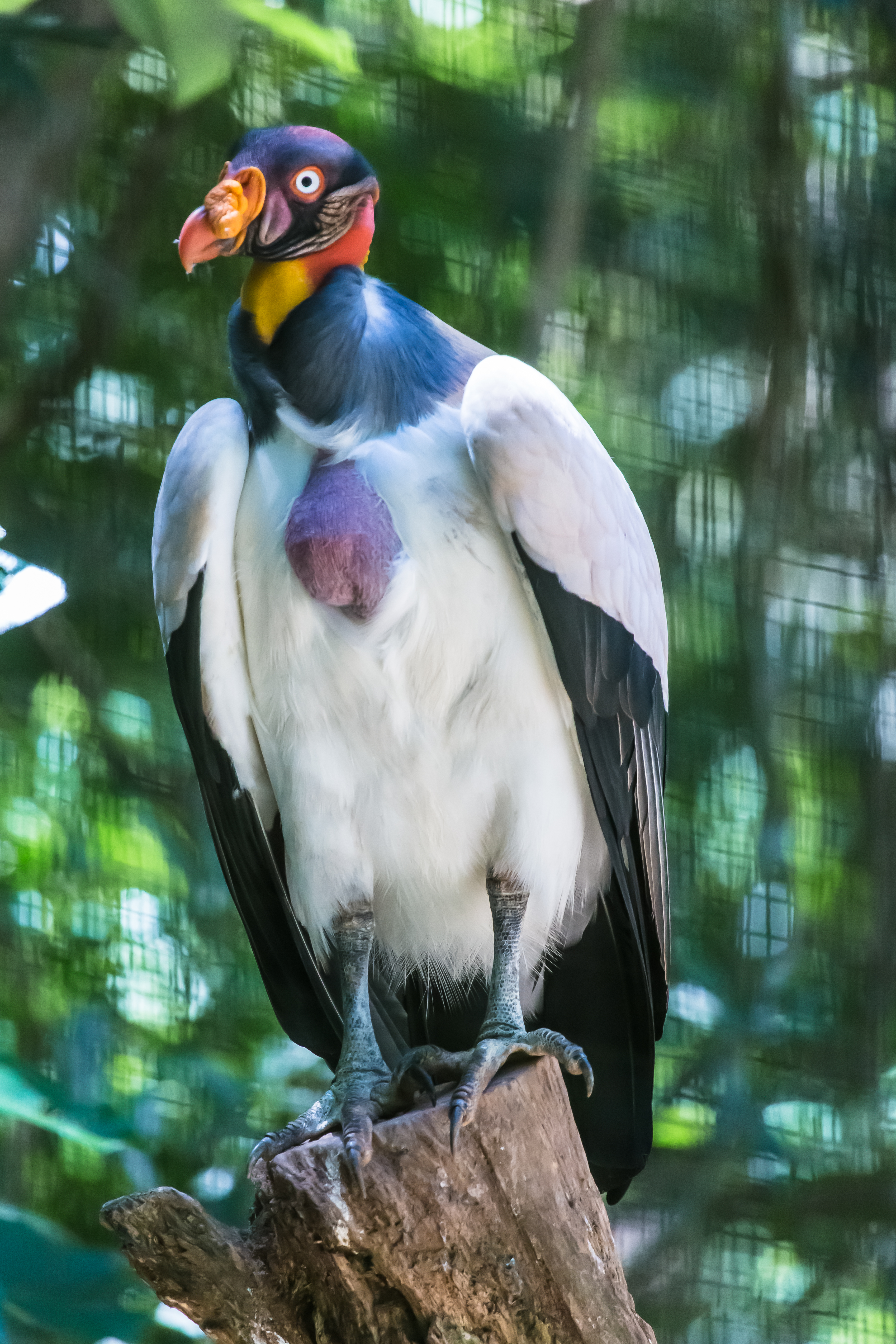 Zooparque - Itatiba/SP